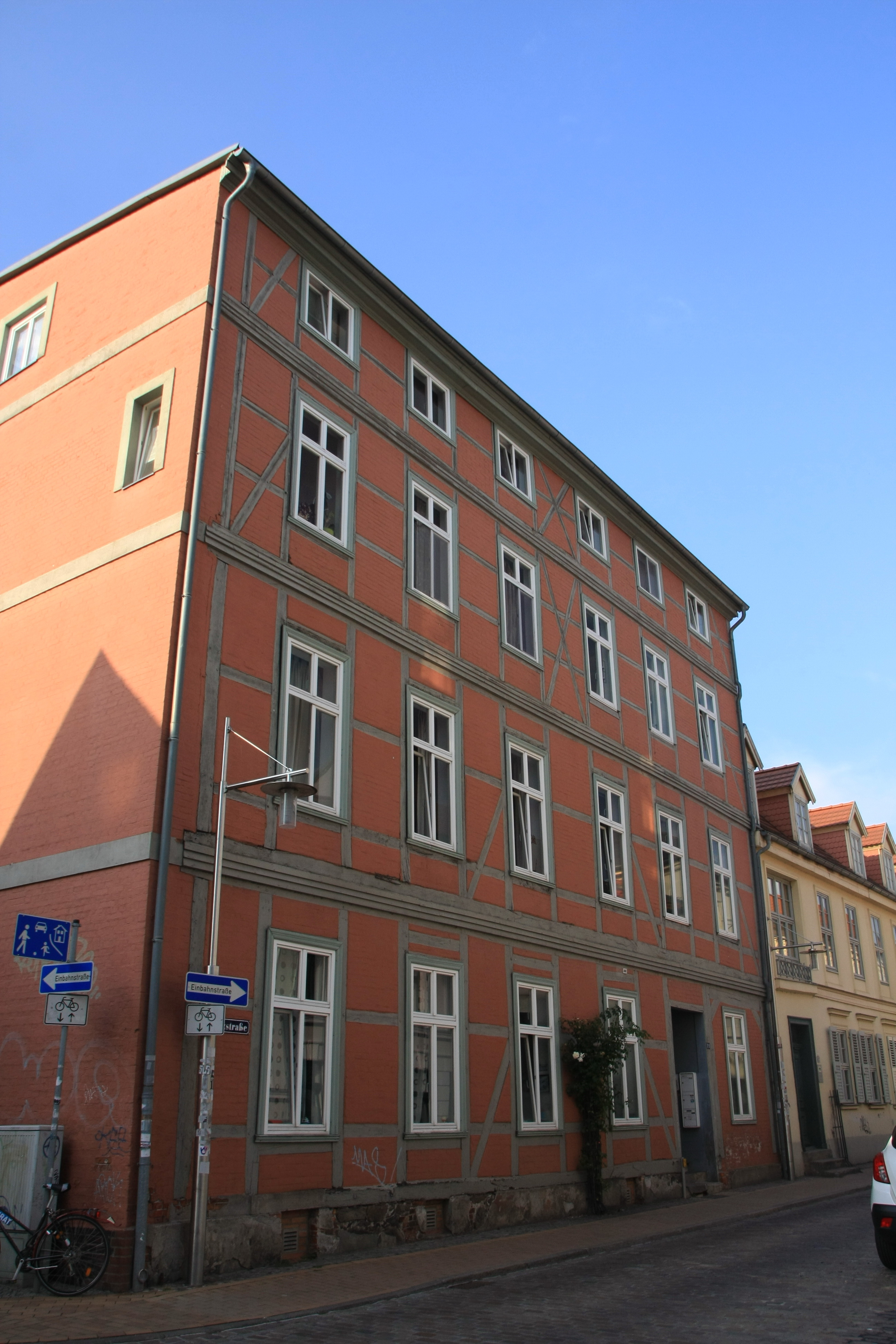 19055 Schwerin, Münzstraße 19